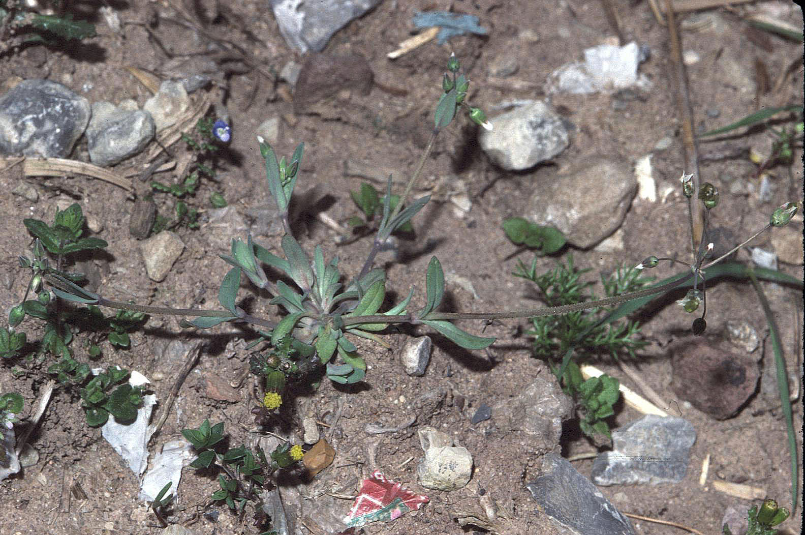 eigenes Foto von 1989, Unterfranken